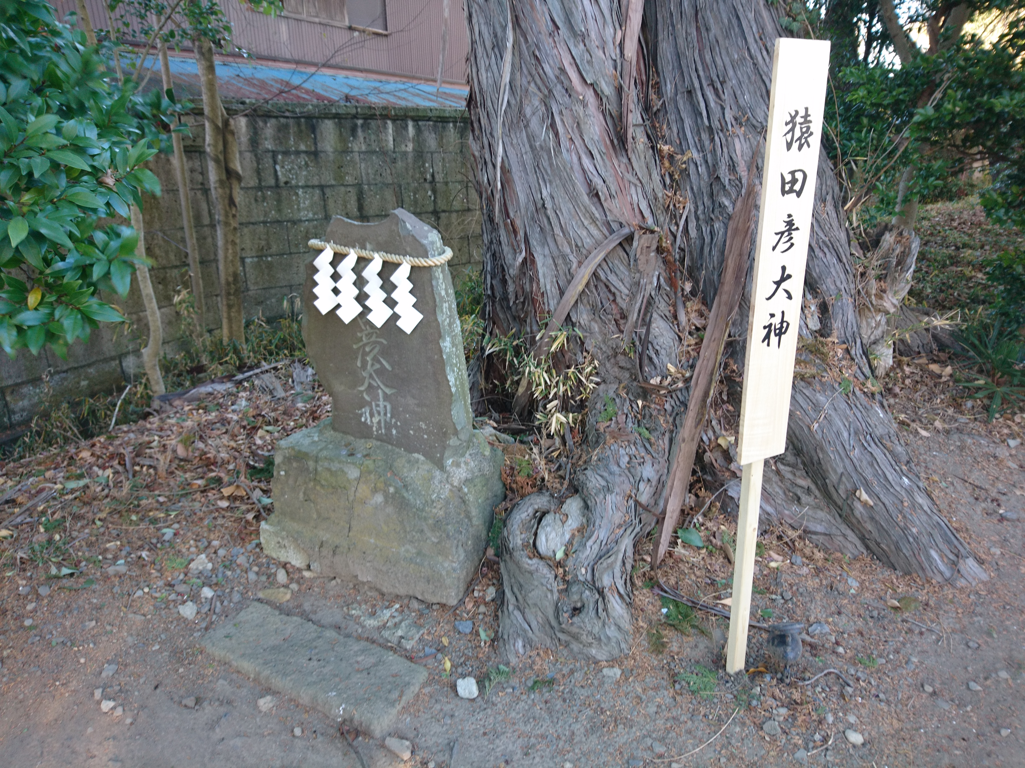 栃木県栃木市にある平柳星宮神社の境内社・猿田彦大神。